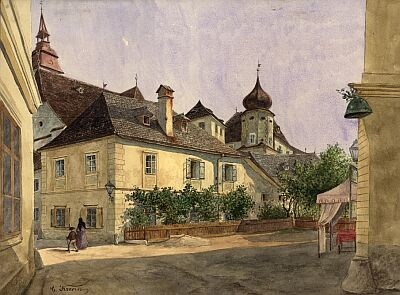 Postkarte hauptstrasse sb